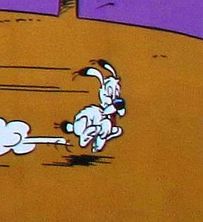 Le chien Idéfix, détail d'une peinture murale des personnages de la BD Astérix, de Goscinny et Uderzo. Lieu : Rue de la Buanderie 33/35 (Washuisstraat 33/35), École maternelle 8/2, ville de Bruxelles, Belgique. Extrait retouché de File:De_Galliers_vallen_aan.JPG.